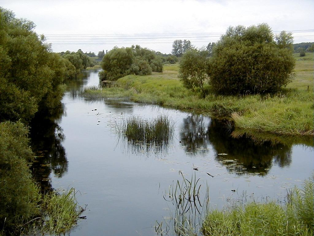 Rītupe pie Kārsavas 2000-07-22